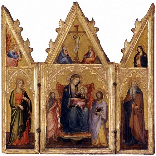 Triptych